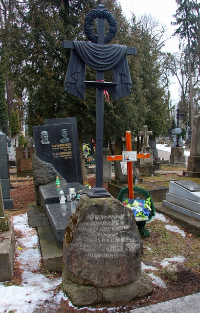 Stanisław Jaszowski .Личаківський цвинтар , поле № 5.